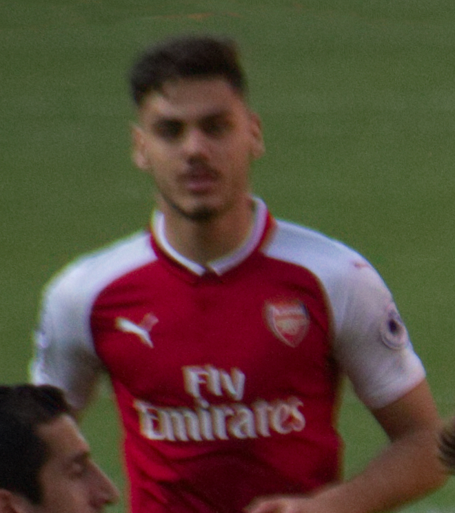 17 Merci Arsène - Celebrating Kolasinac's goal